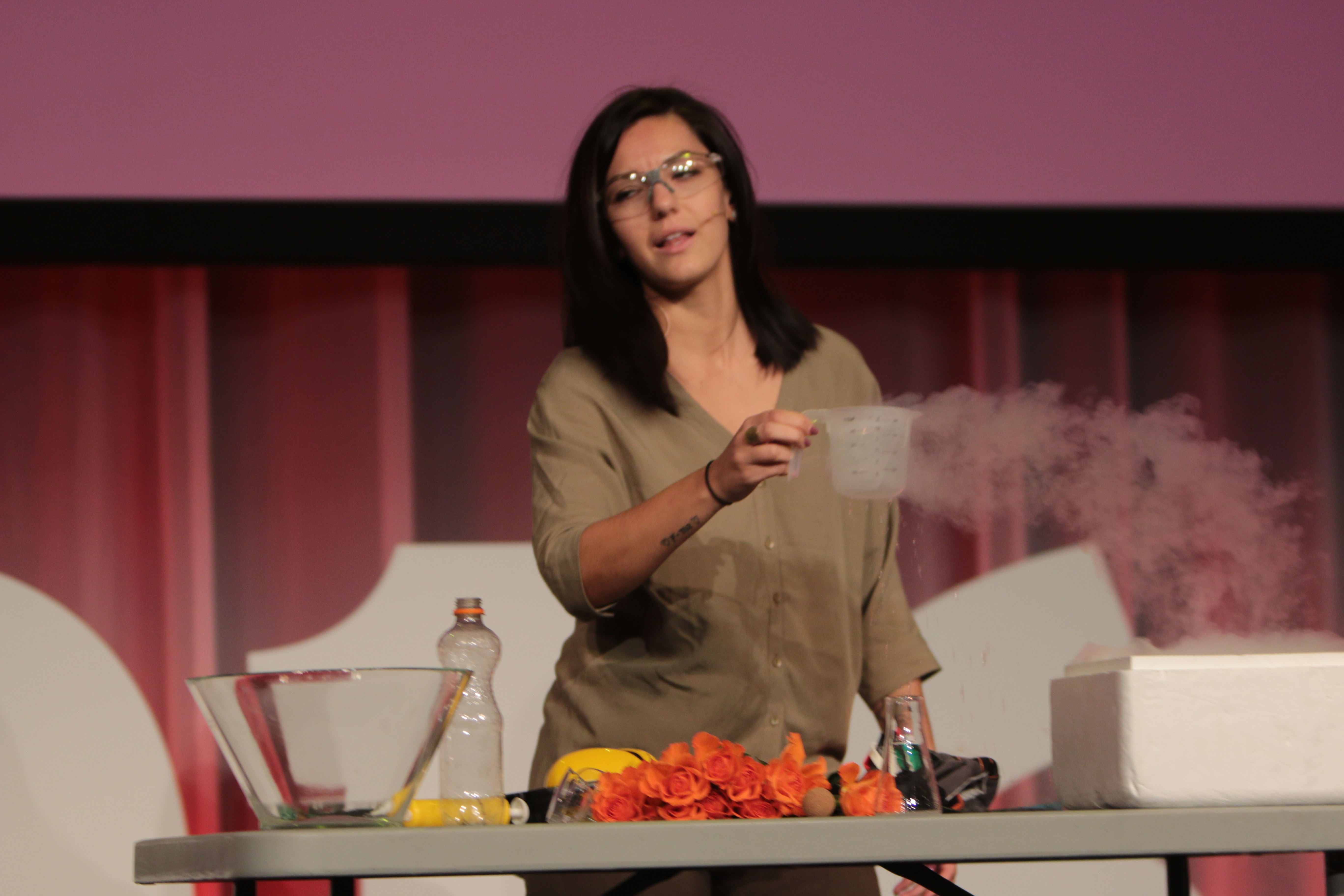 Medvirkende: Selda Ekiz